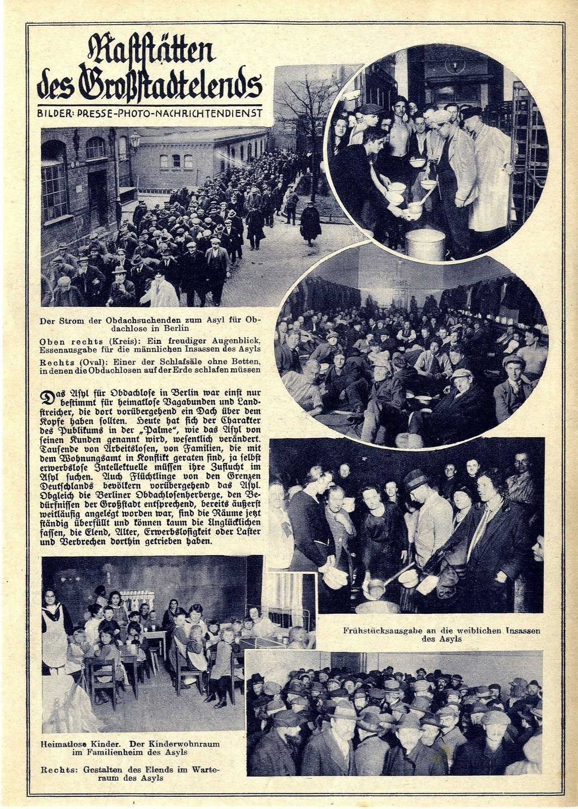 Raststatten des Großtadtelends: Das städtische Obdachlosenasyl "Palme", Fröbelstraße 15, in Berlin-Prenzlauer Berg